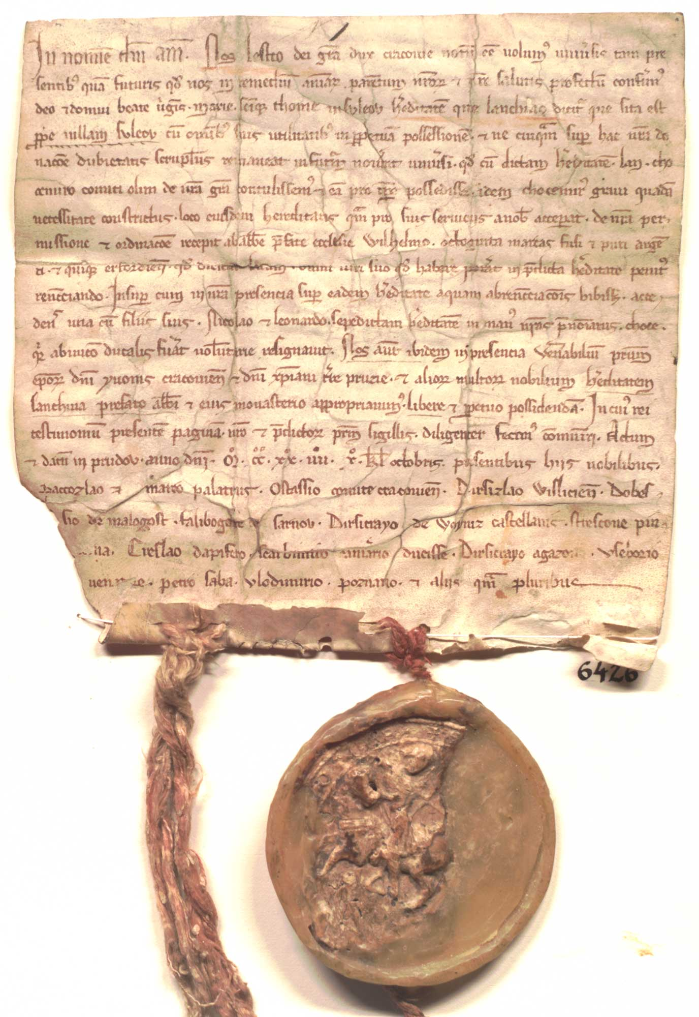 Leszek, ks. krakowski, nadaje klasztorowi cystersów w Sulejowie wieś Łęczno, którą niegdyś posiadał z jego nadania komes Chociemir. Język: łac. Opis zewnętrzny: oryg., 1 k. pergaminowa, 17,5 x 16,8 + 1,2 cm; pieczęć na sznurze, sznur i nacięcie